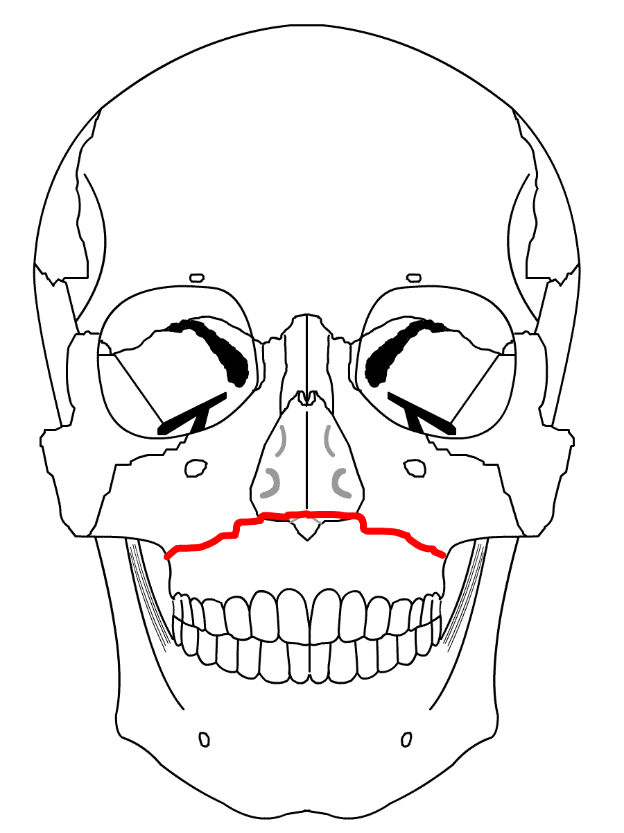 Le Fort 1 Fracture